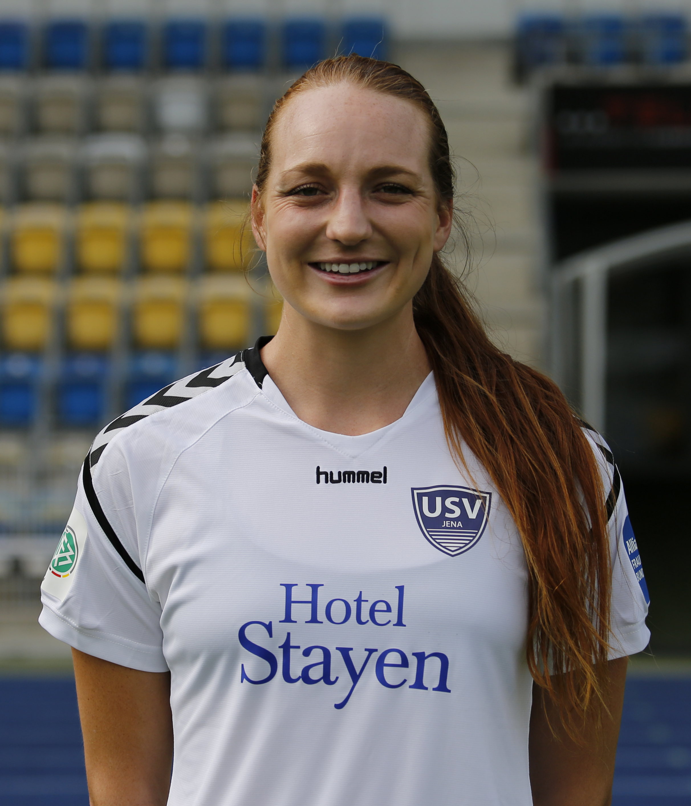 Hannah Keane